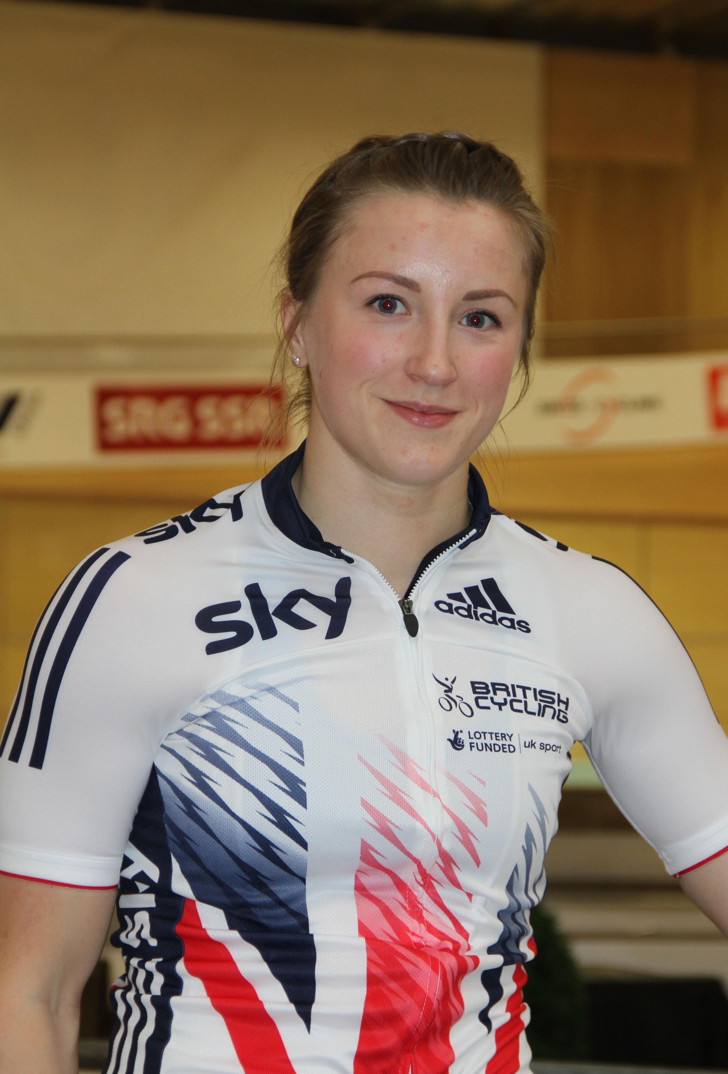 Victoria Williamson, britische Radsportlerin The making of this document was supported by the Community-Budget of Wikimedia Germany.